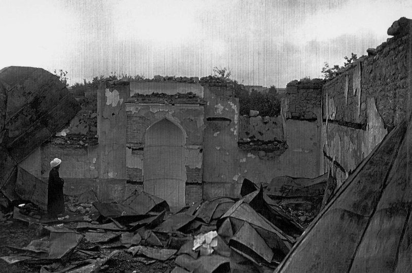 Hacı Qasım məscidinin daxili görünüşü. (Axund Hacı Şıx Həbiblə)